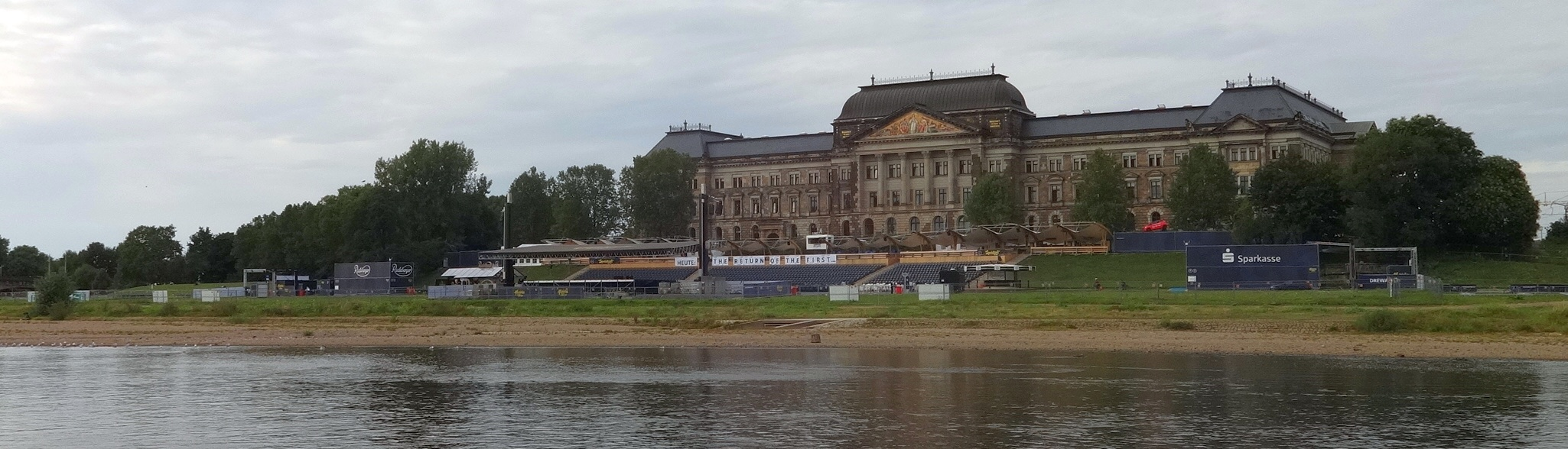 Filmnächte am Dresdner Elbufer, vom Schiff aus gesehen. Dahinter das Sächsische Staatsministerium der Finanzen und Kultus